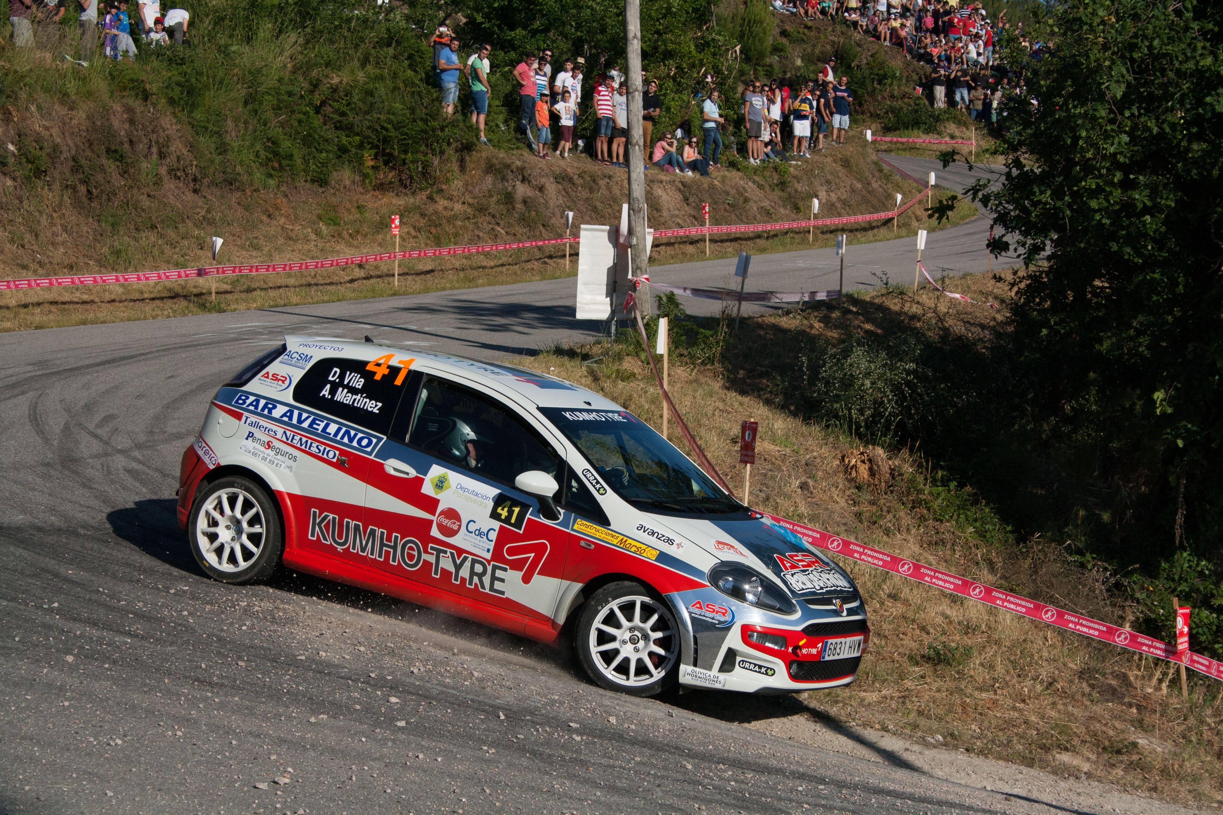 TC 2-4 (Nigrán)